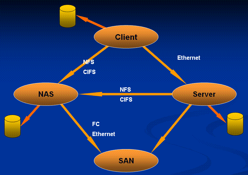 Comparative